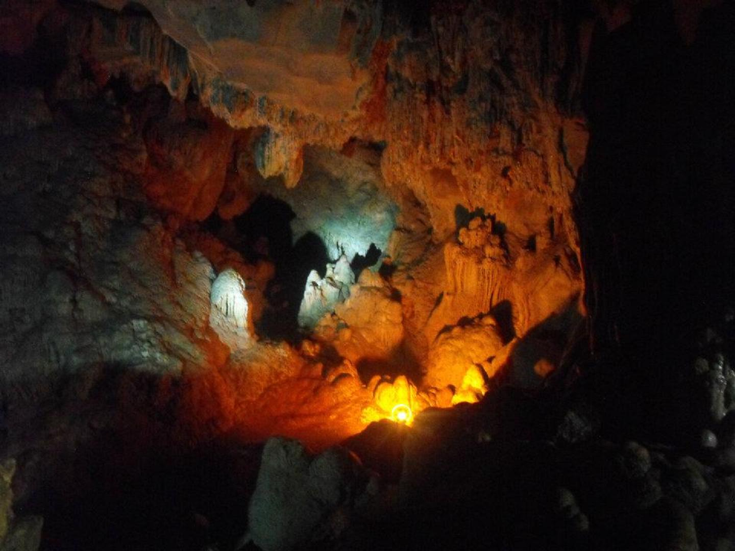 Grutas de Coconá, en el municipio de Teapa, Tabasco, México.